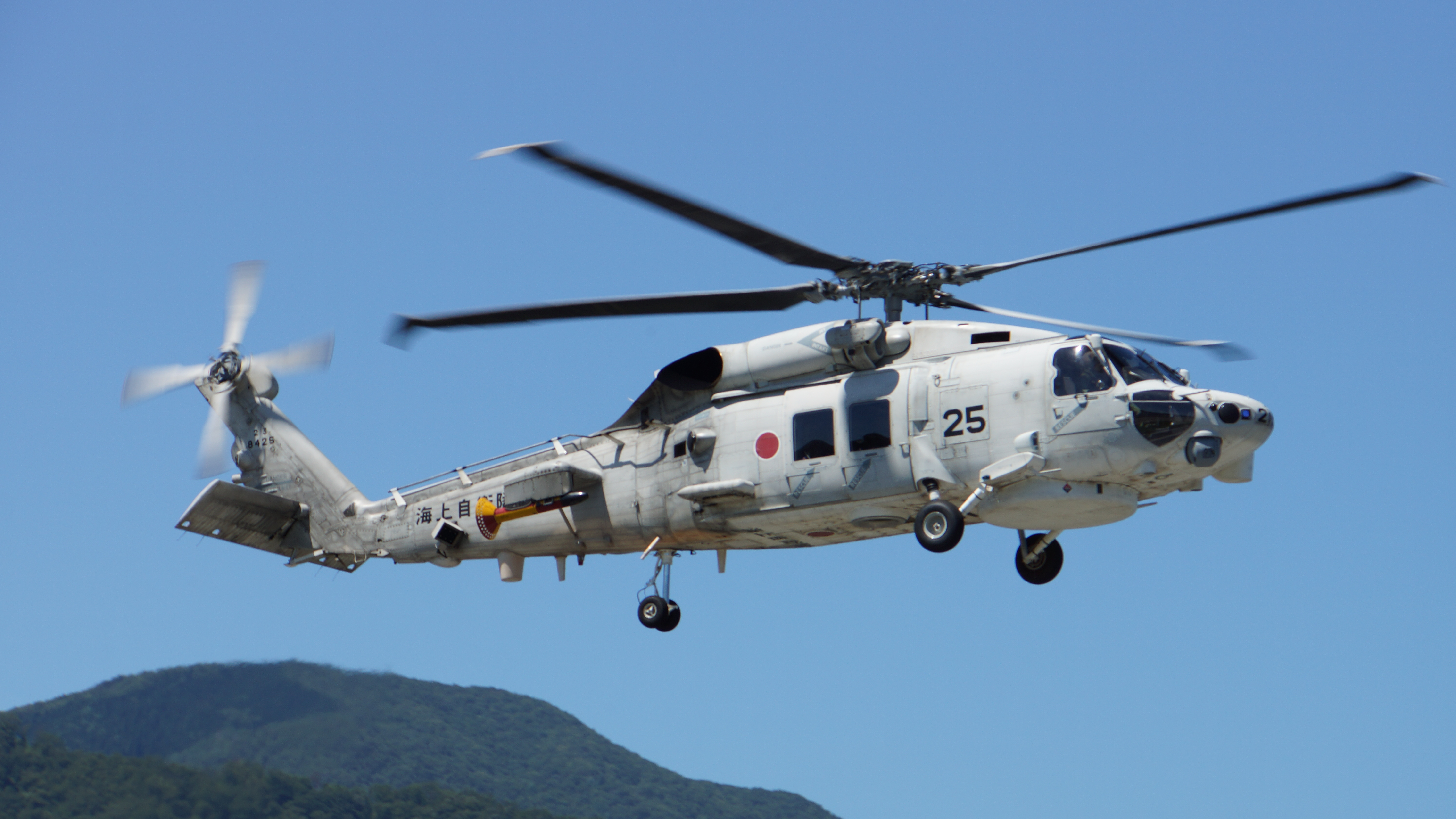 海上自衛隊 SH-60K哨戒ヘリコプター（8425号機） 飛行中。2015年7月26日 舞鶴航空基地にて。